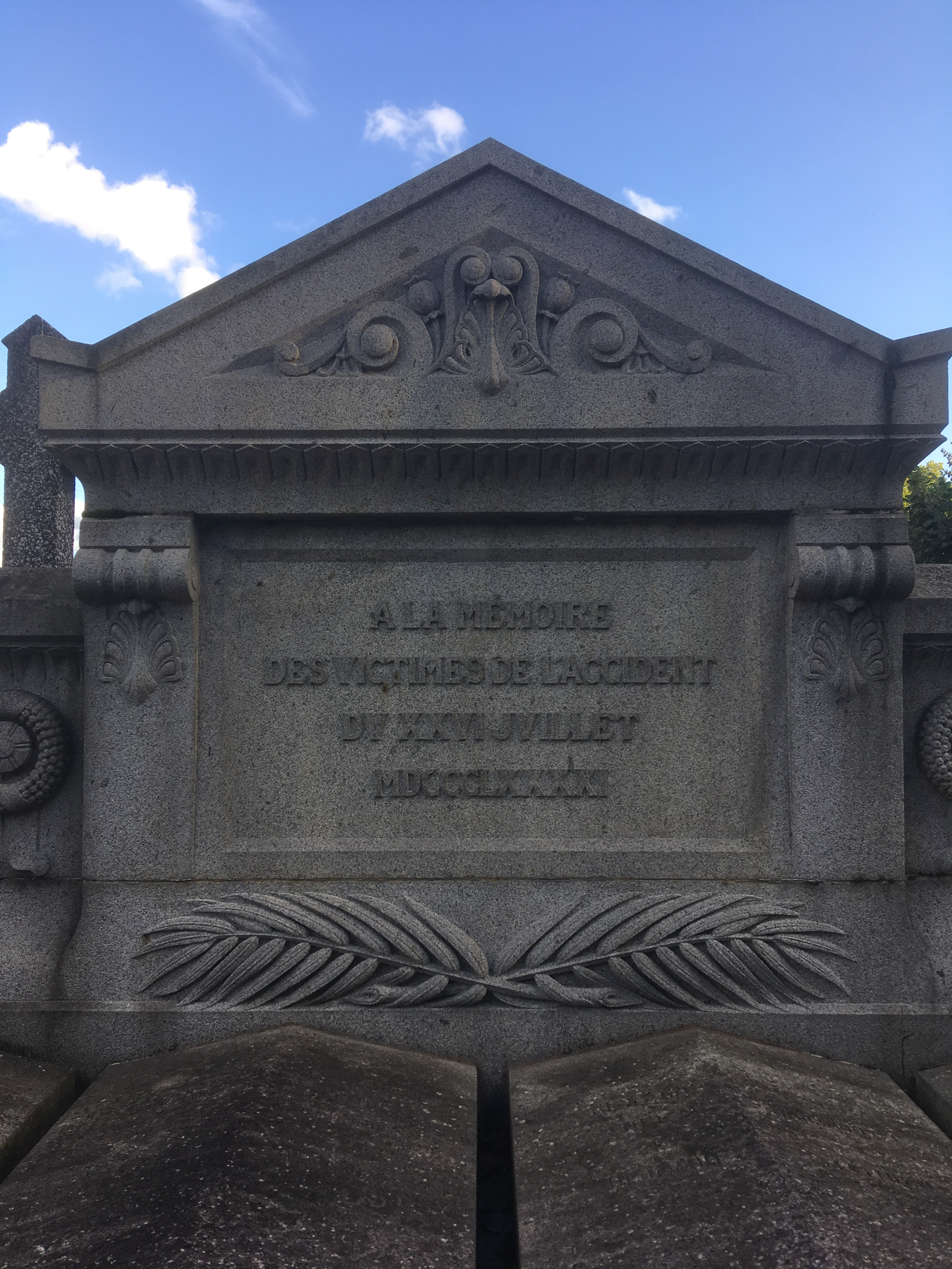 Monument à la mémoire des morts de l'accident de train du 26 juillet 1891, à Saint-Mandé, France.